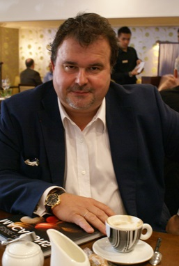 Pierre Hermè